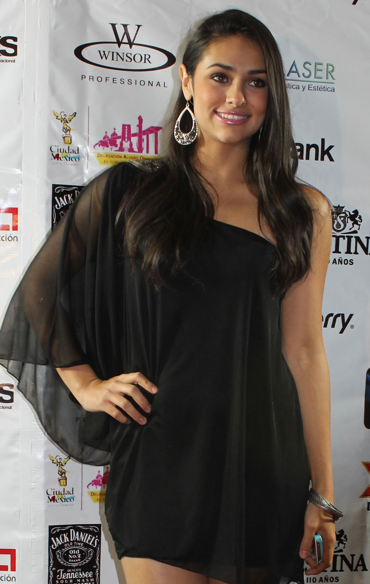 Cocktail de la moda 2012 Renata Notni *Foto cortesia de G7Magazine.MX